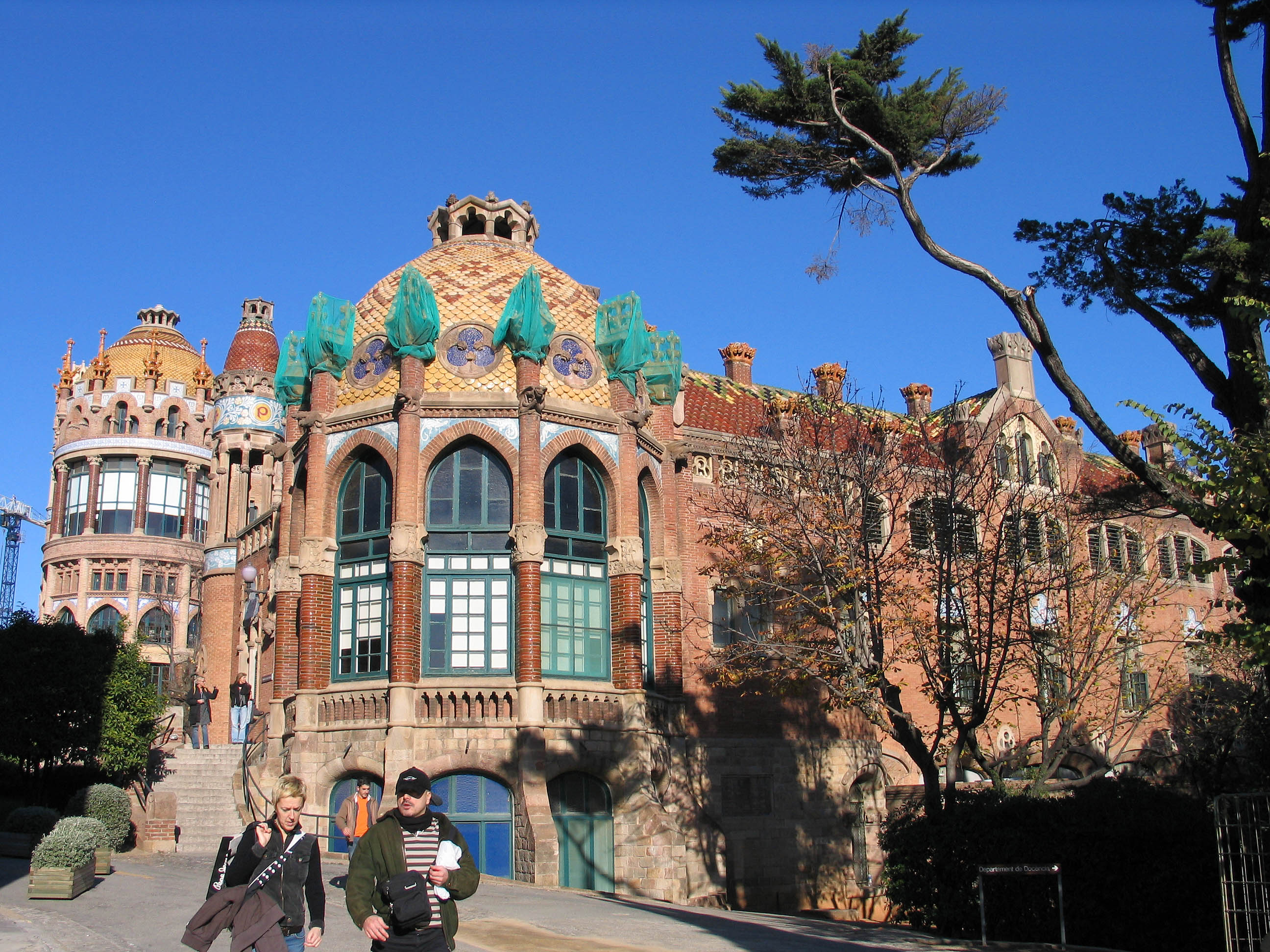 Hospital de Santa Creu i Sant Pau, Barcelona Photograph: Luidger (25. Dezember 2006)